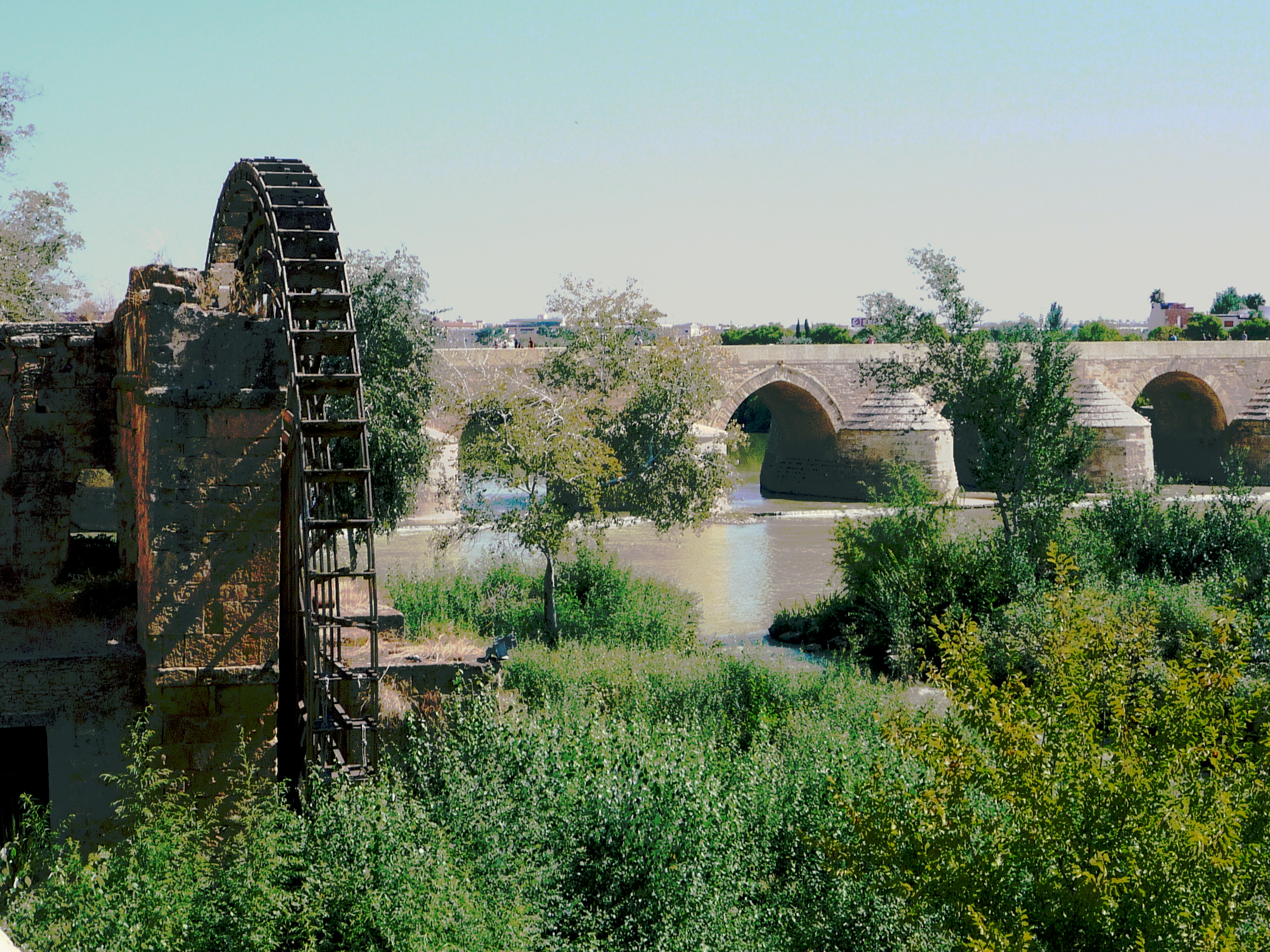 Das alte Wasserrad an der Puente Romano findet heute leider keinen Zulauf mehr. Blick auf die östlichen Altstadtviertel von der Uferpromenade aus. See more about in a related article (DE) of my travelblog.